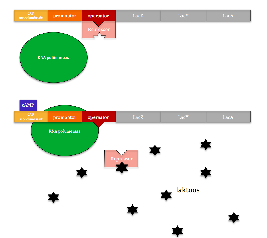 Üleval: laktoosioperon on inaktiivne laktoosi puudumisel. Repressor on seondunud operaatorile ja RNA polümeraas ei saa kinnituda ega transkriptsiooni alustada. All: laktoosioperon on aktiivne, kuna laktoos inhibeerib repressori, RNA polümeraas pääseb promootorile ligi ja initsieerib transkriptsiooni. Glükoosi puudumisel on cAMP kontsentratsioon suur ja CAP-cAMP kompleksi seondumine kiirendab oluliselt β-galaktosidaasi tootmist.